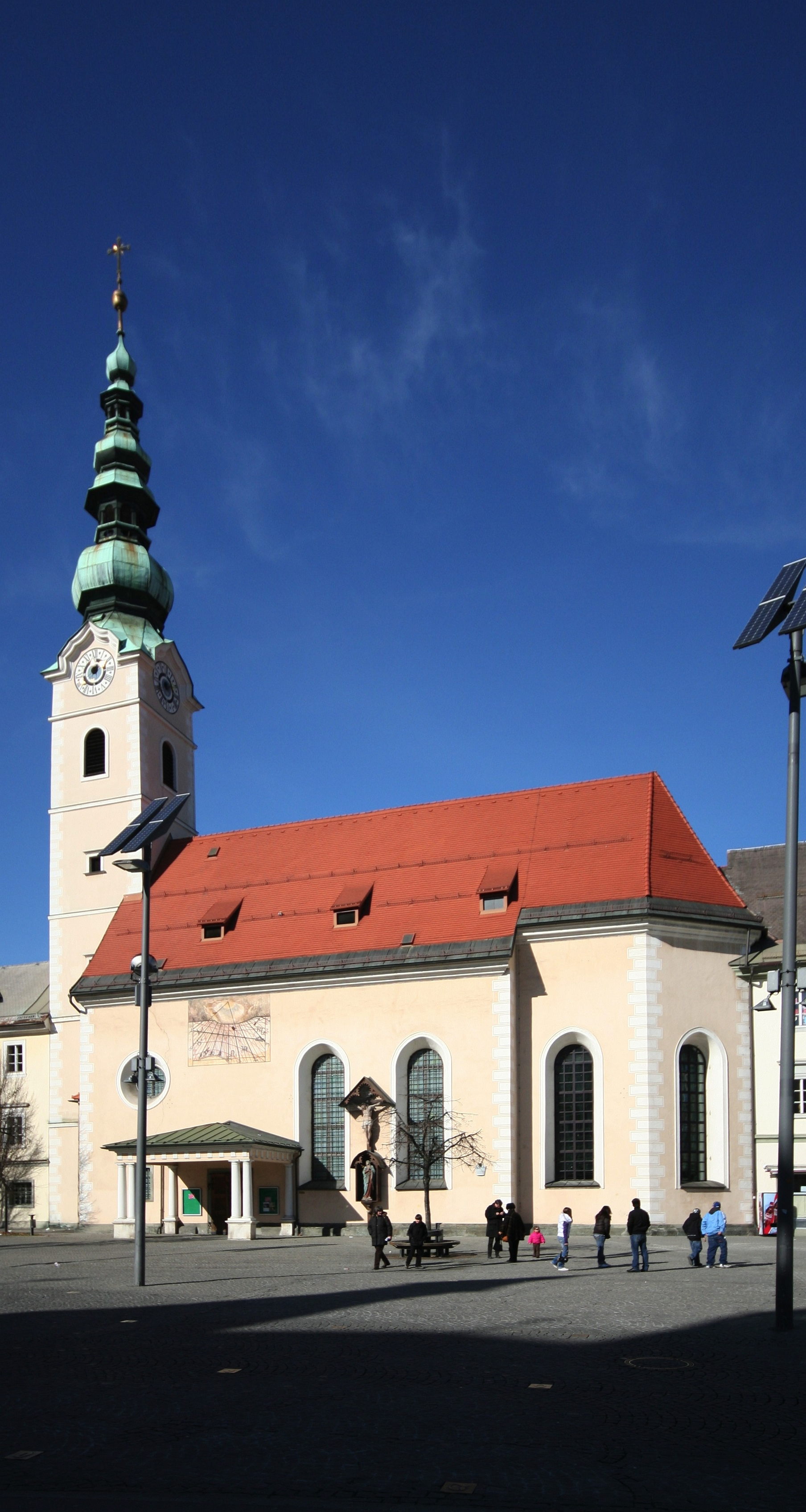 Heiligengeistkirche in Klagenfurt, Kärnten